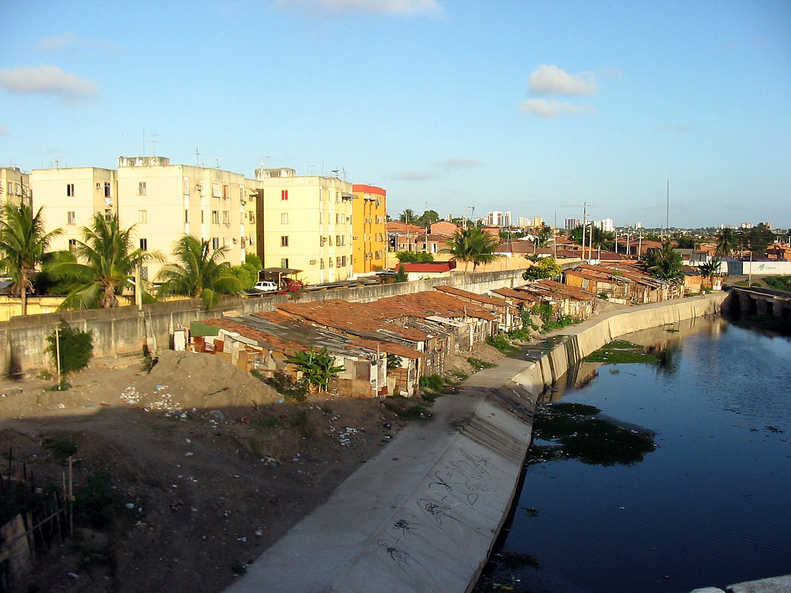 Fotoda favela Cidade de Deus surgida da ocupação em 2004 desta área em Fortaleza.